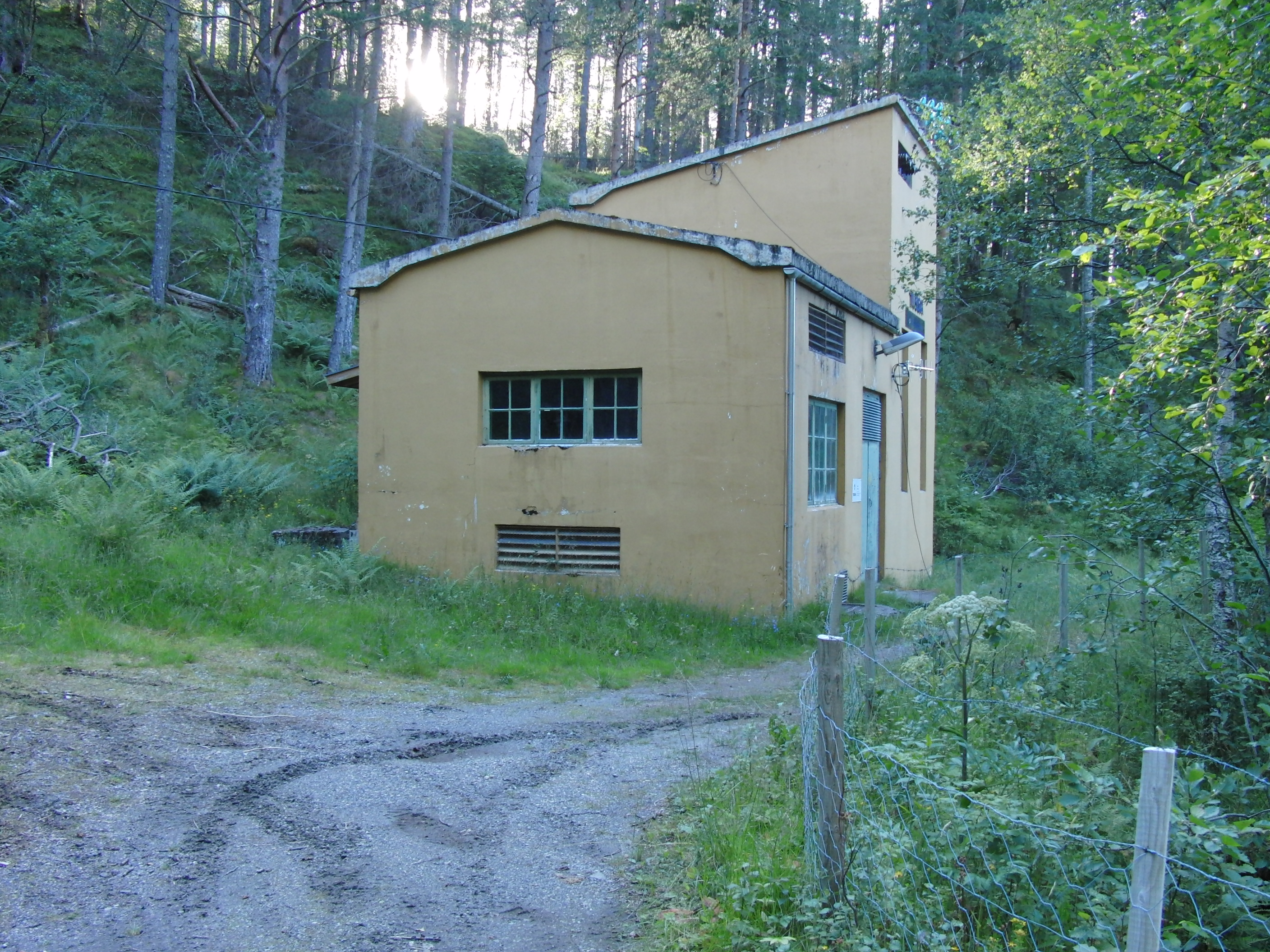 Vartdal kraftverk